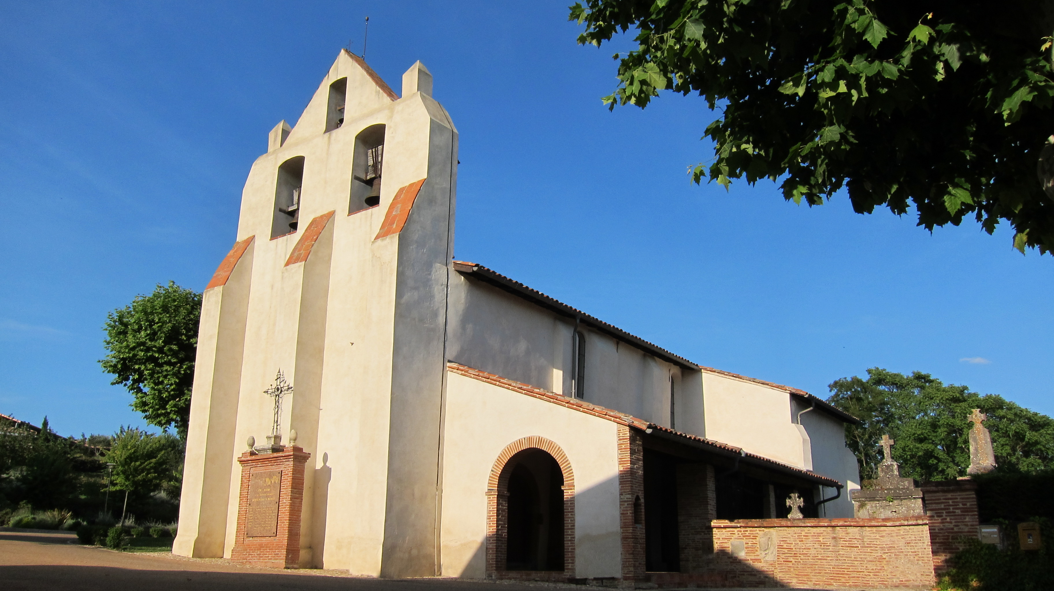 Pin-Balma (Haute-Garonne, France) : L'église Saint-Pierre.